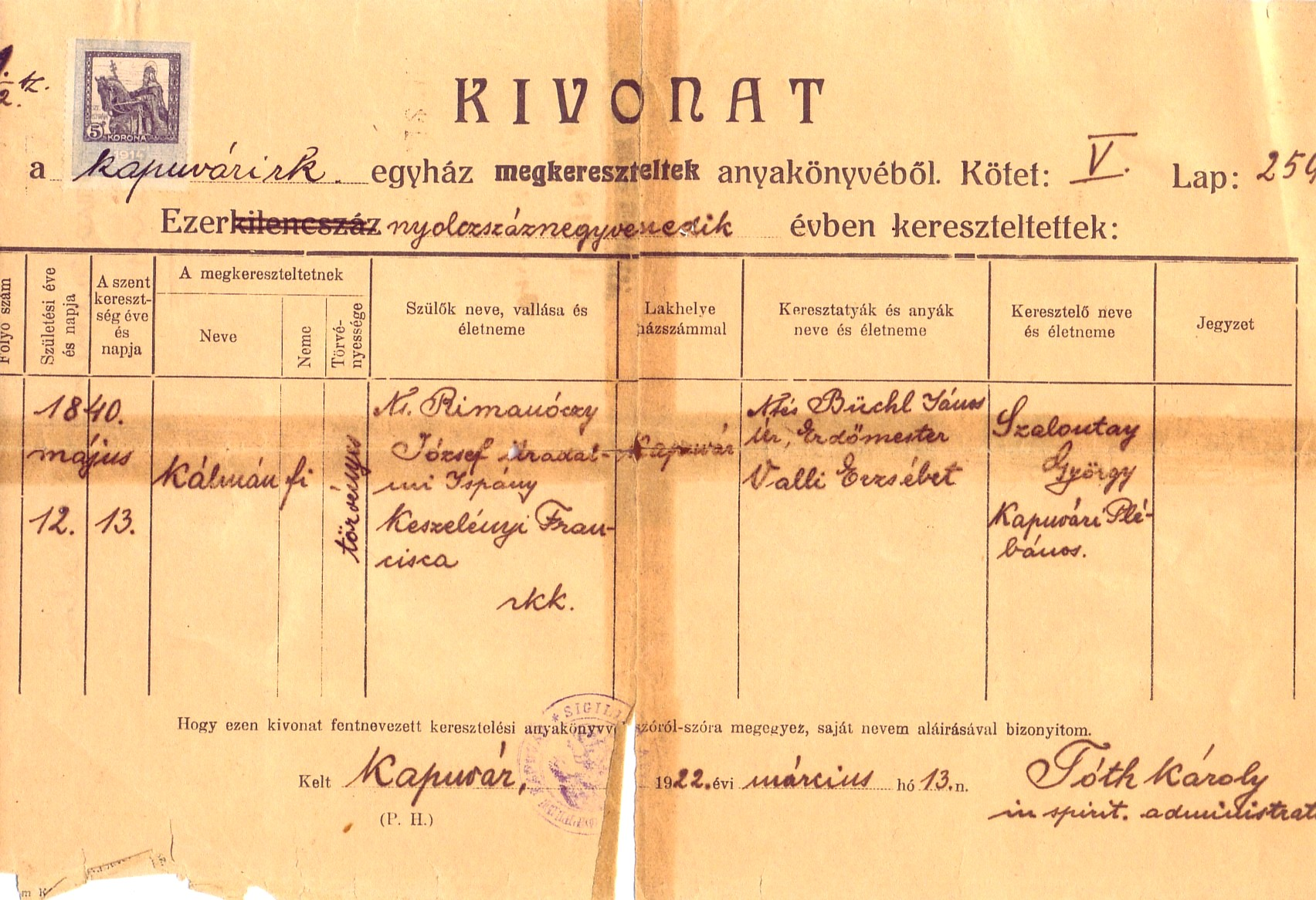 Rimanóczy Kálmán id. keresztelési anyakönyvi kivonata